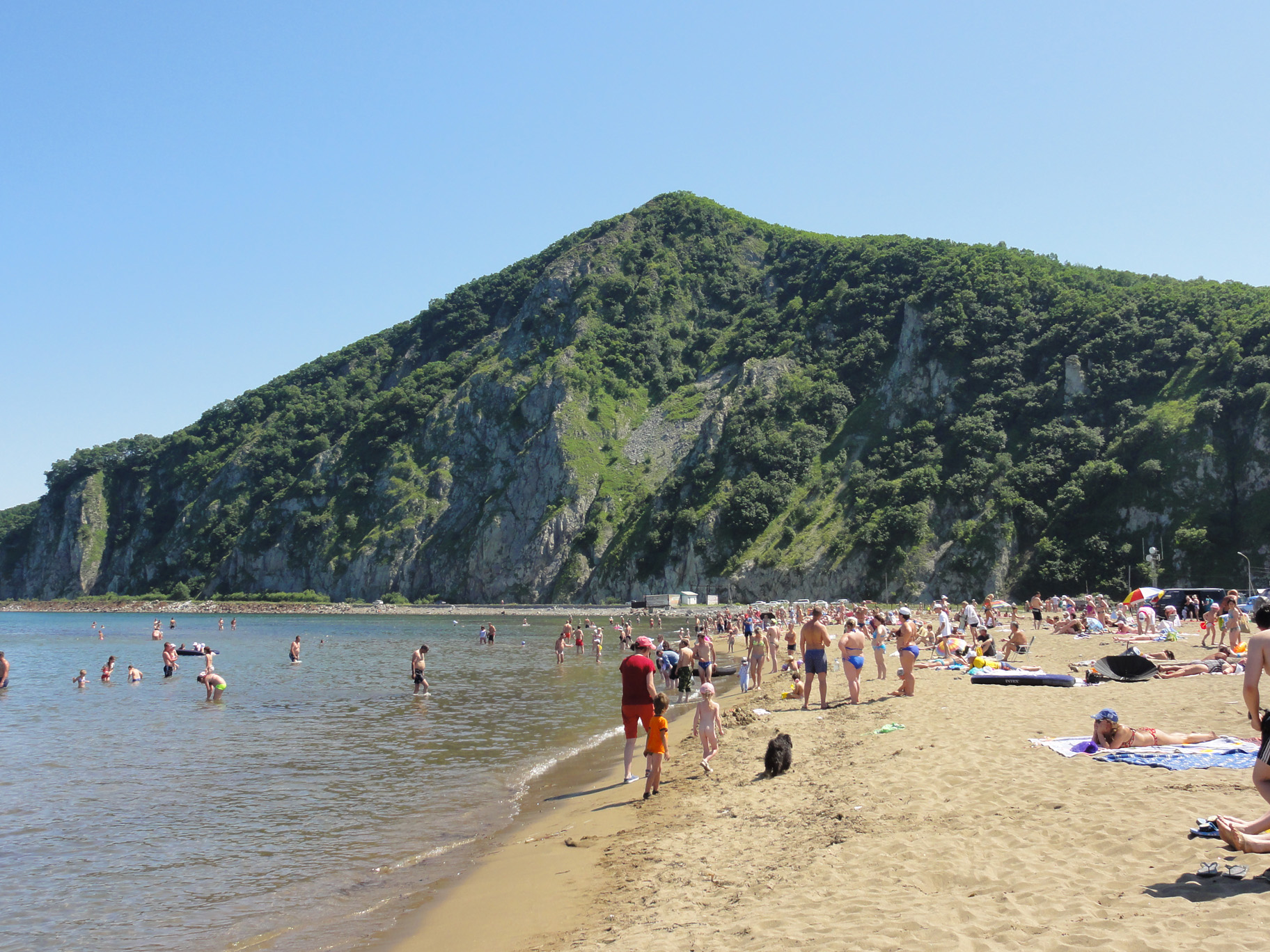 Крупнейший пляж Дальнегорского городского округа, расположенный в п. Смычка